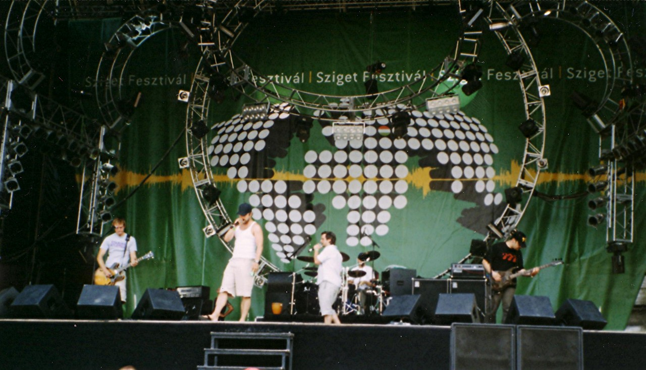 Die H-Blockx auf dem Sziget Festival 2003 in Budapest Fotograf: ASK aufgenommen am: August 2003